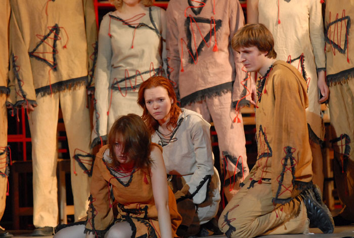 Спекаткль "День подлинной свободы" Театра "Ювента"